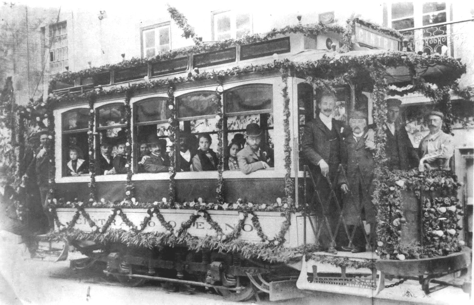 Viagem inaugural do Elétrico de Sintra.